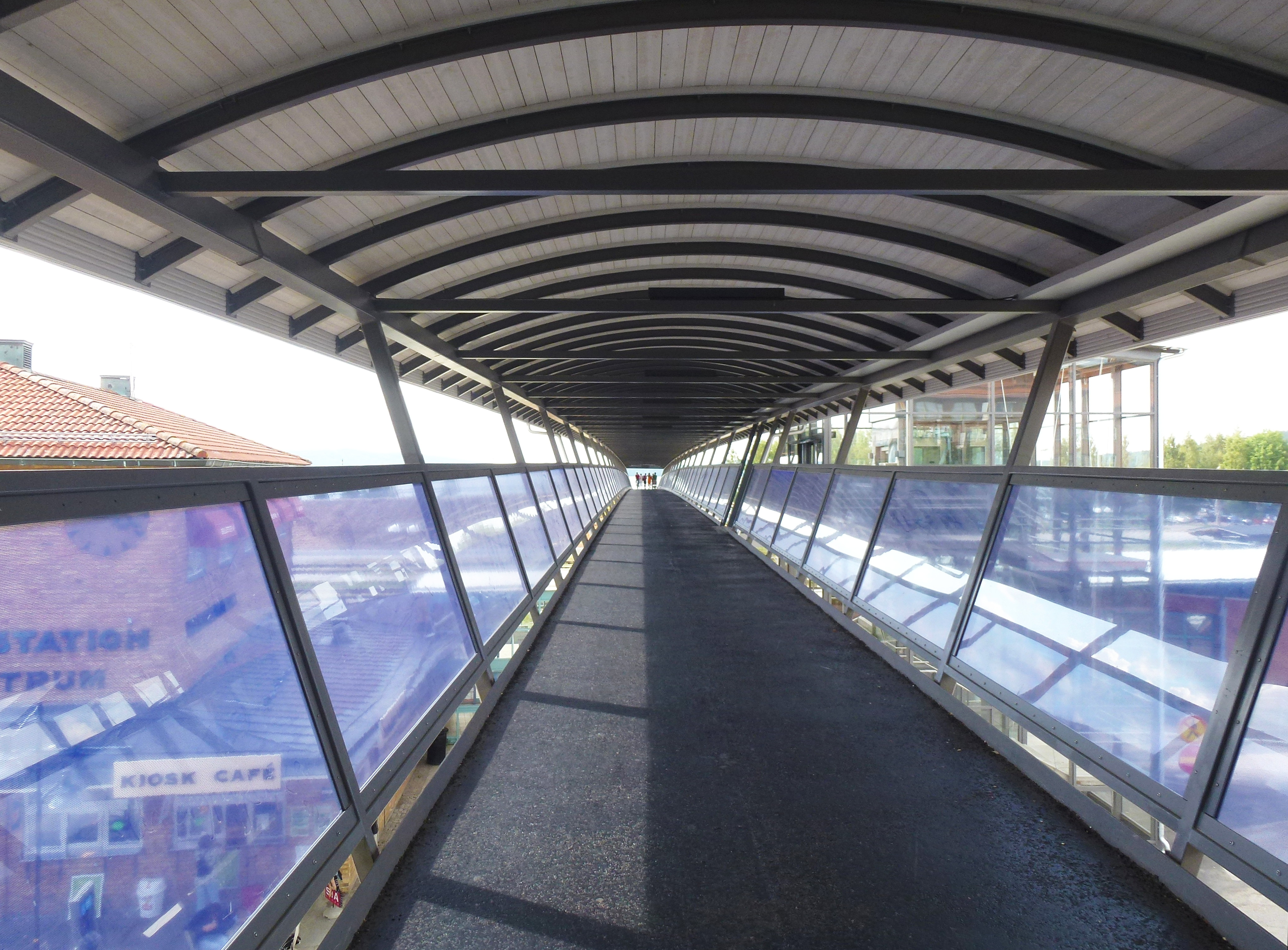 Gång- och cykelbron "Entré Ludvika"